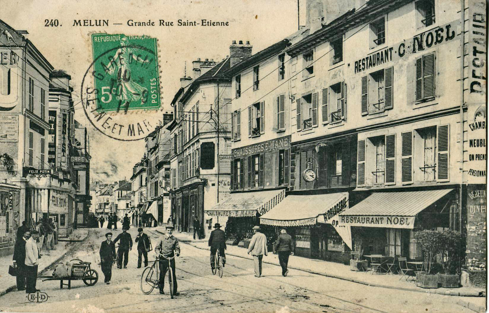 Carte postale ancienne éditée par ELD, n°240 : MELUN - Grande Rue Saint-Etienne